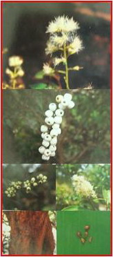 ดอกของต้นเสม็ดขาว